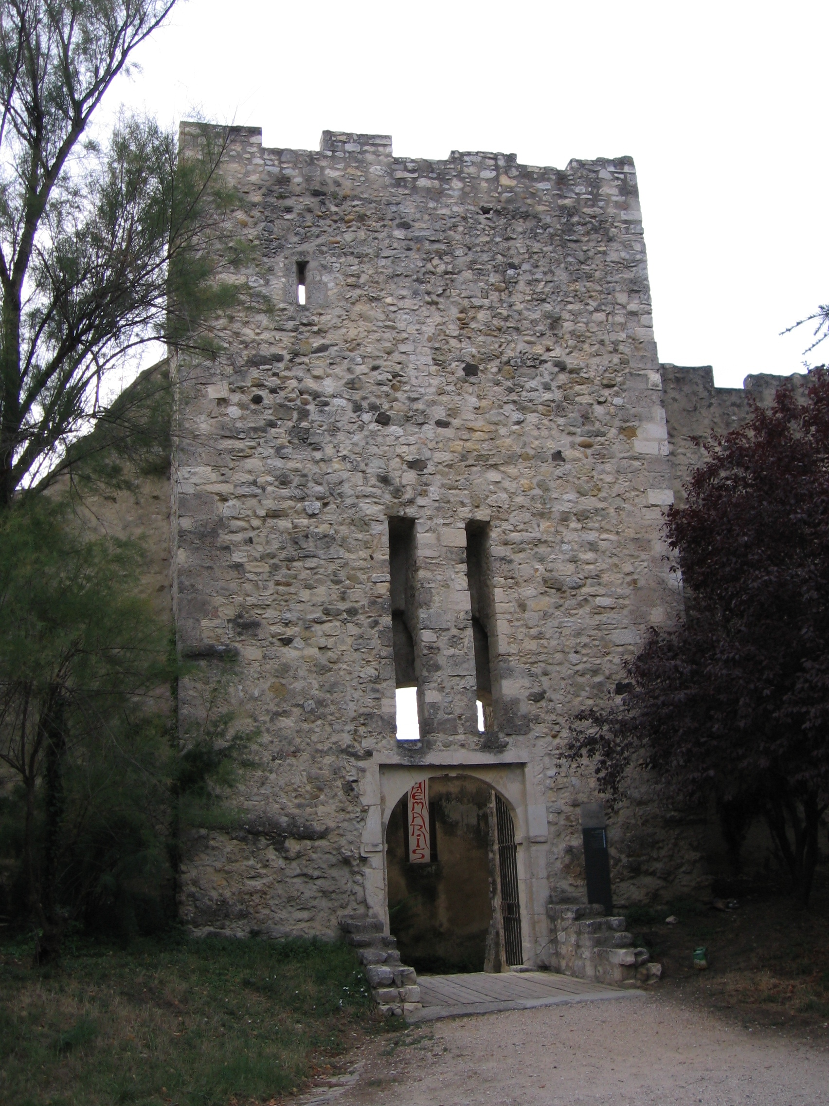 Château des Adhémar, Montelimar